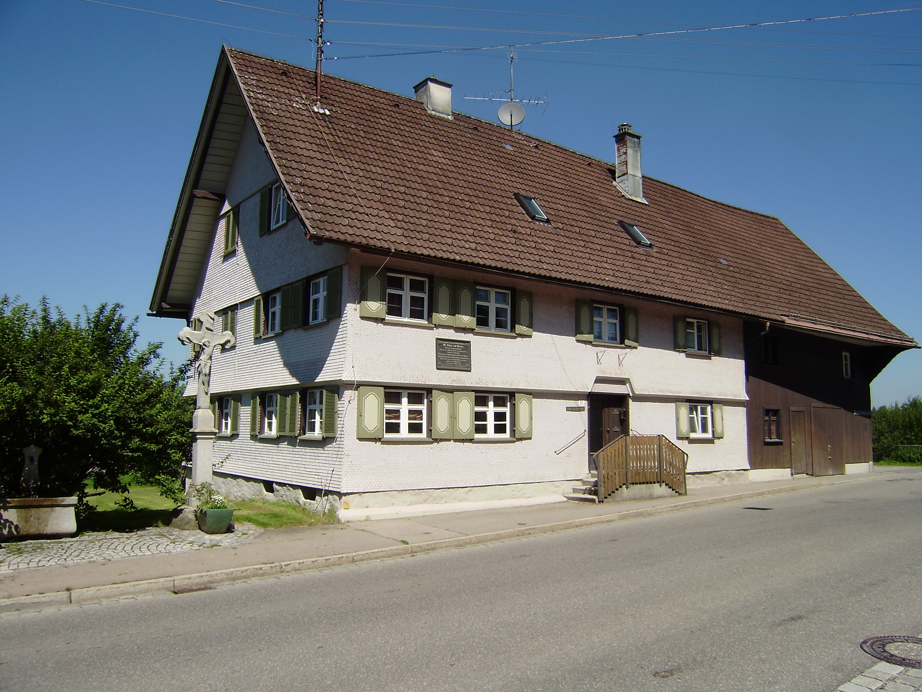 Geburtshaus des Rechtsgelehrten Alois von Brinz in Weiler im Allgäu, Bayern, Deutschland